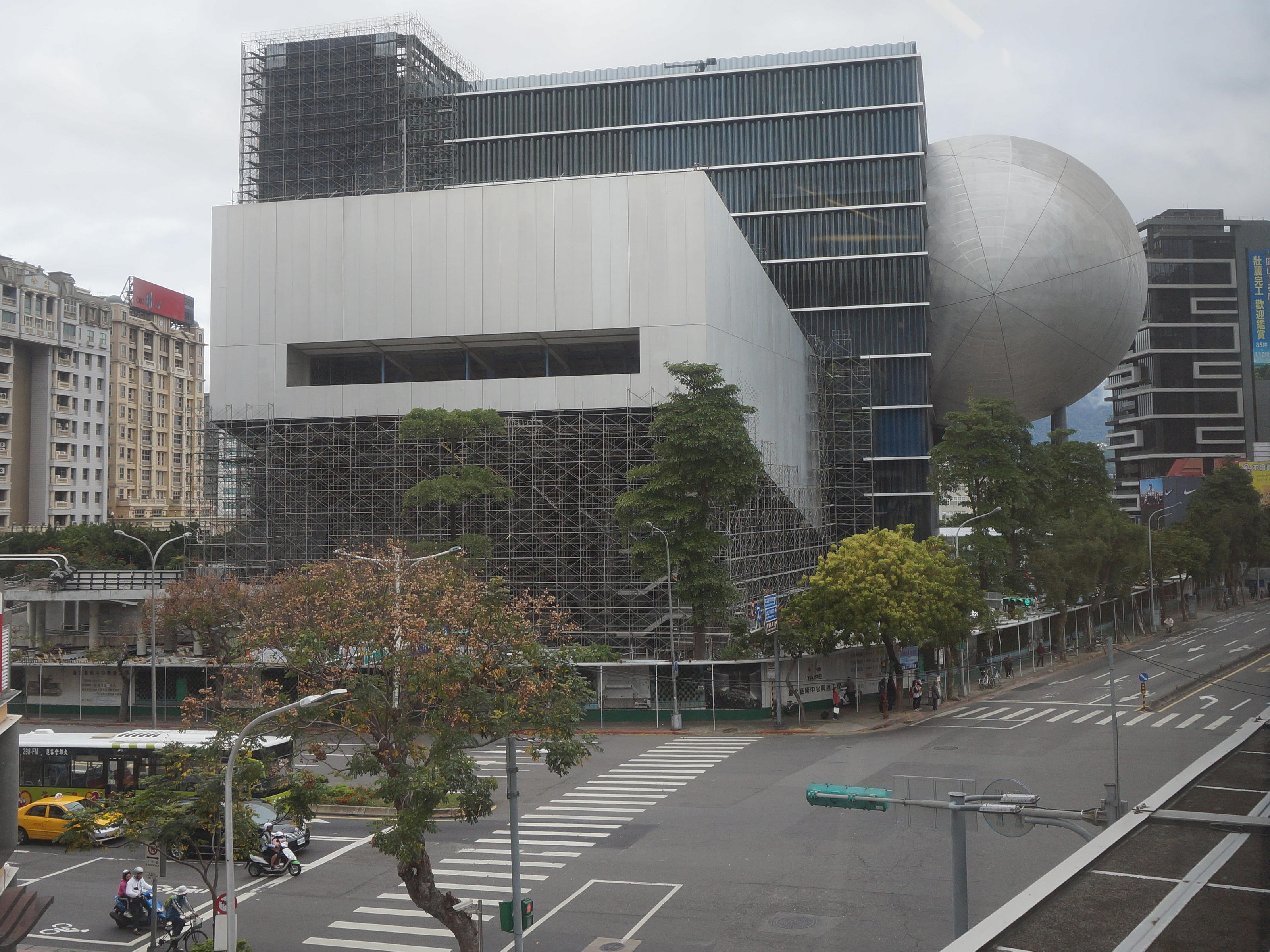 於臺北捷運劍潭站往臺北車站方向列車上拍攝臺北表演藝術中心結構體。